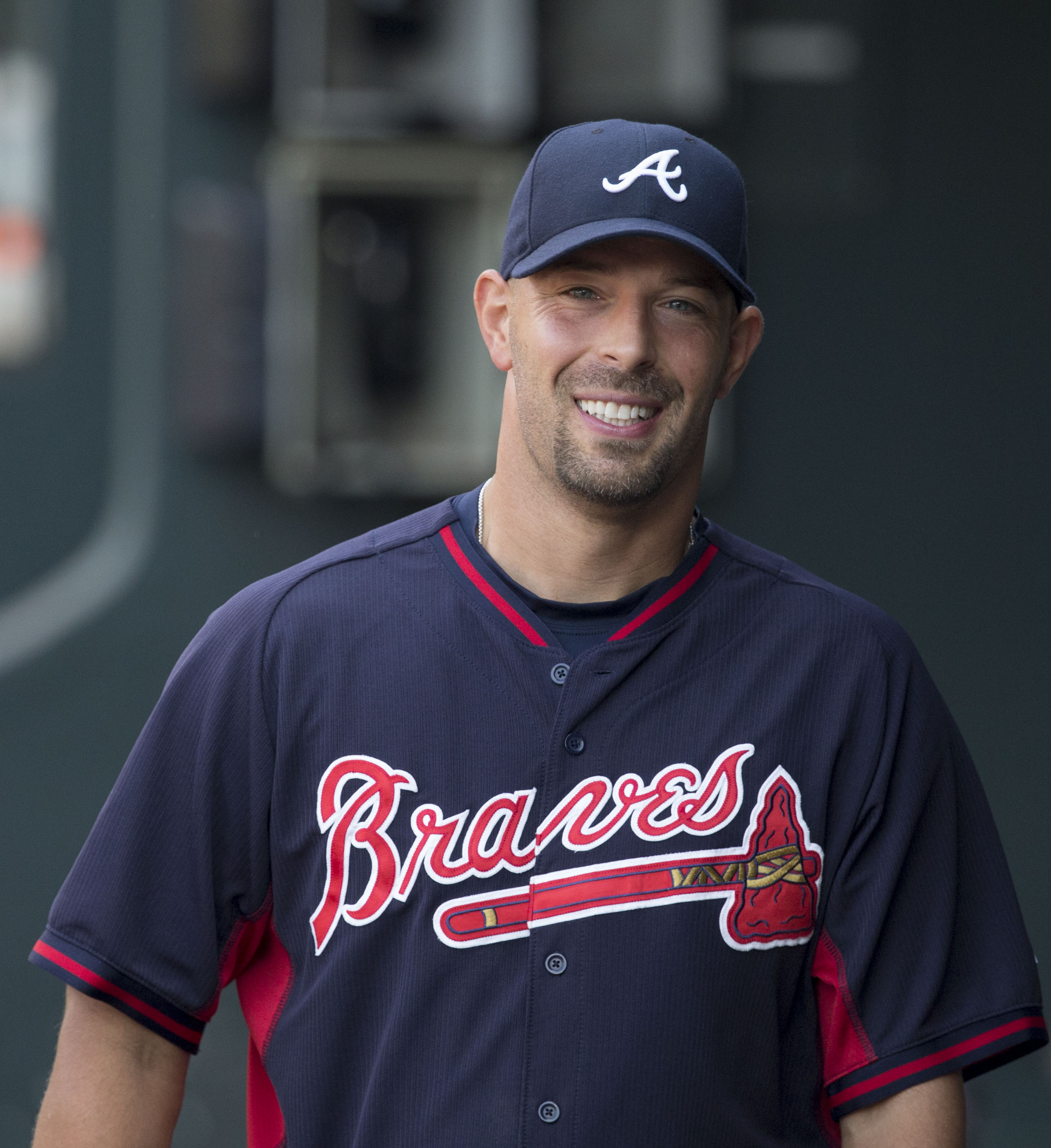 David Aardsma